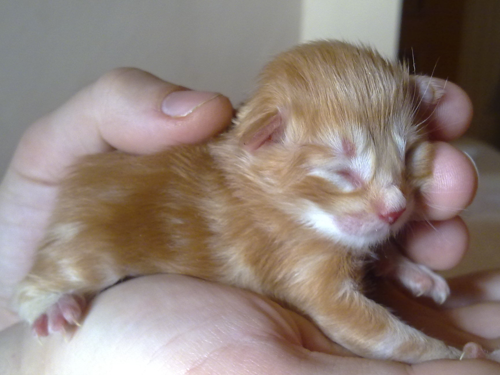 Gata con 1 dia de vida. Foto cedida por el criadero